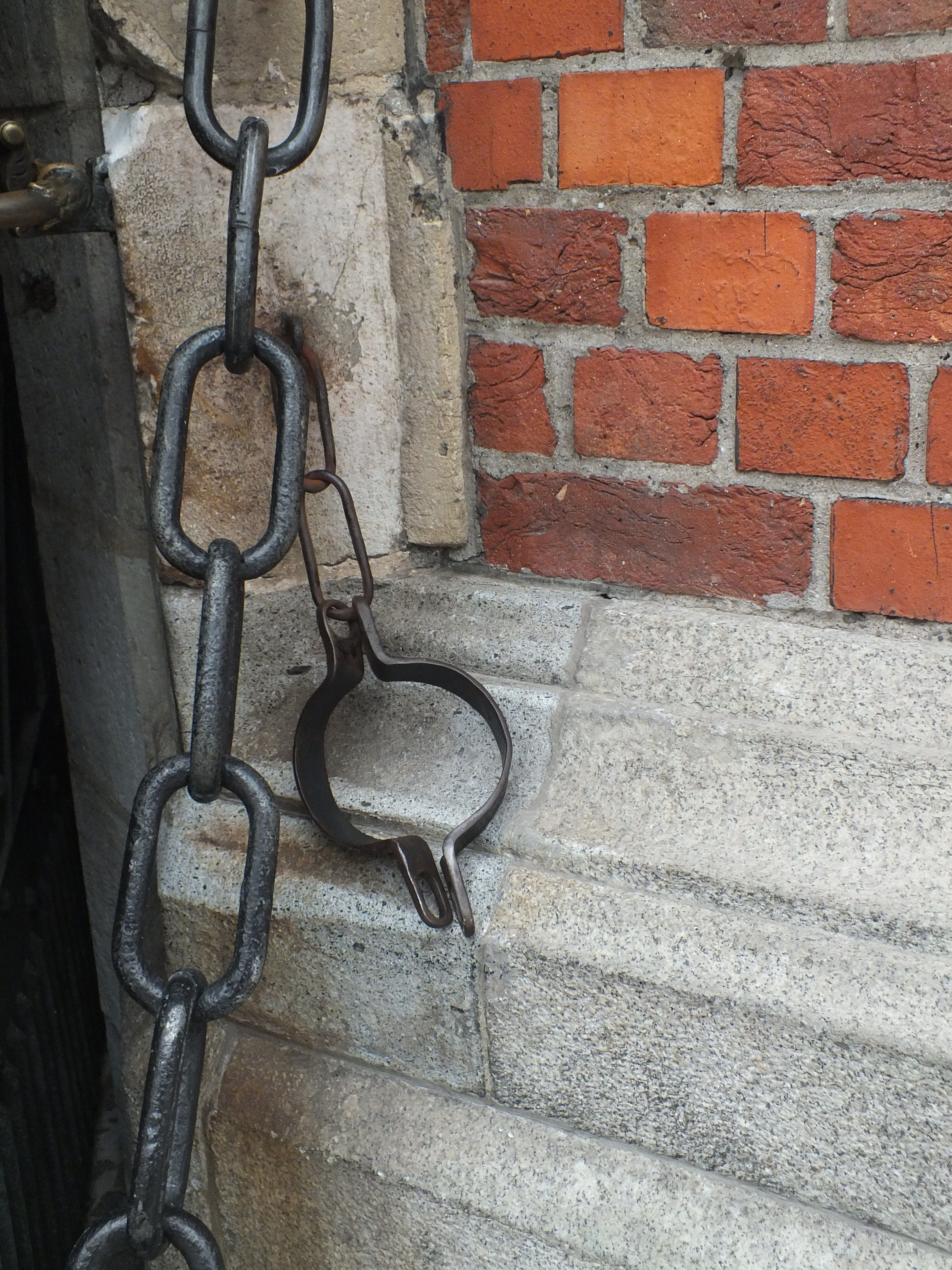 Kuna dla pokutników przy bocznym wejściu do kościoła mariackiego w Krakowie